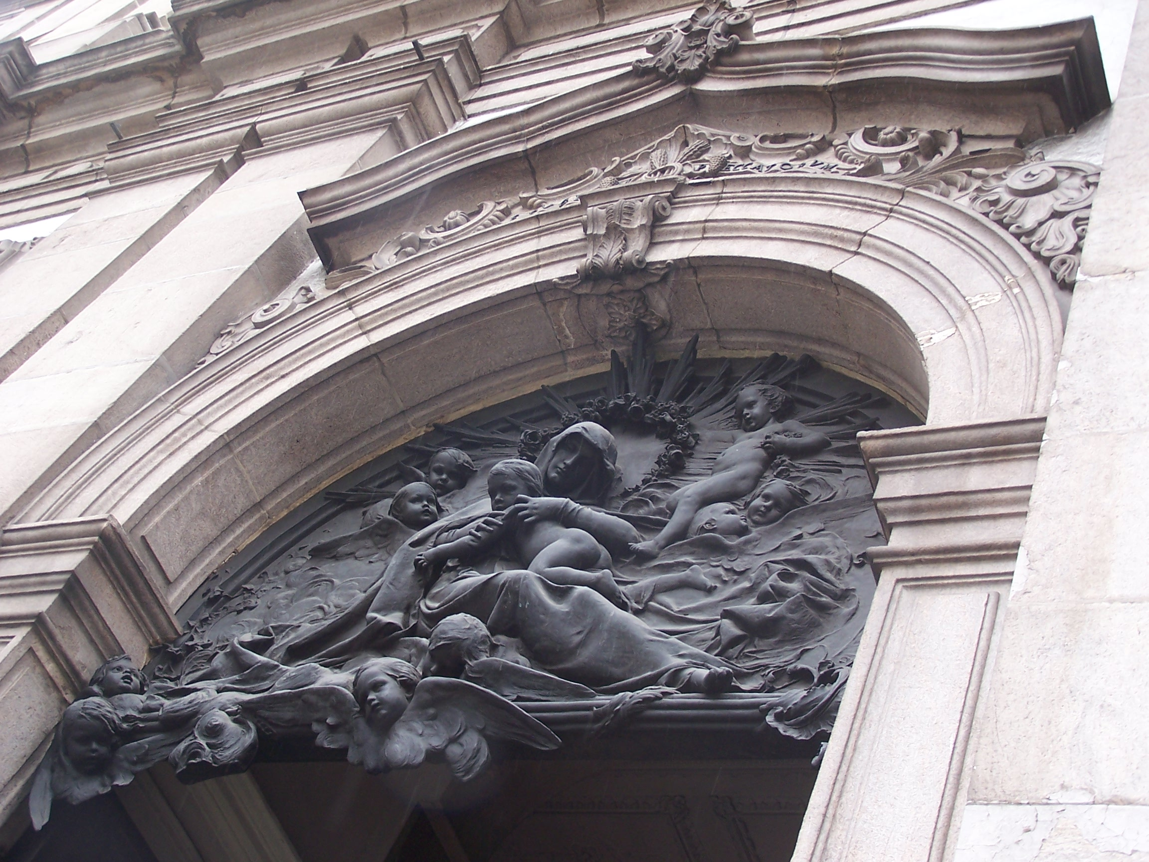 Bronze door of Candelária Church, Rio de Janeiro, Brazil.